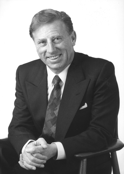 Manfred Weinmann, Oberbürgermeister der Stadt Heilbronn von 1983 bis 1999